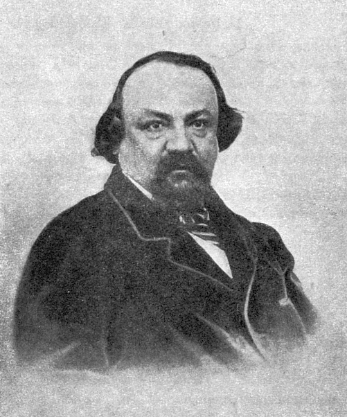 Писемский, Алексей Феофилактович